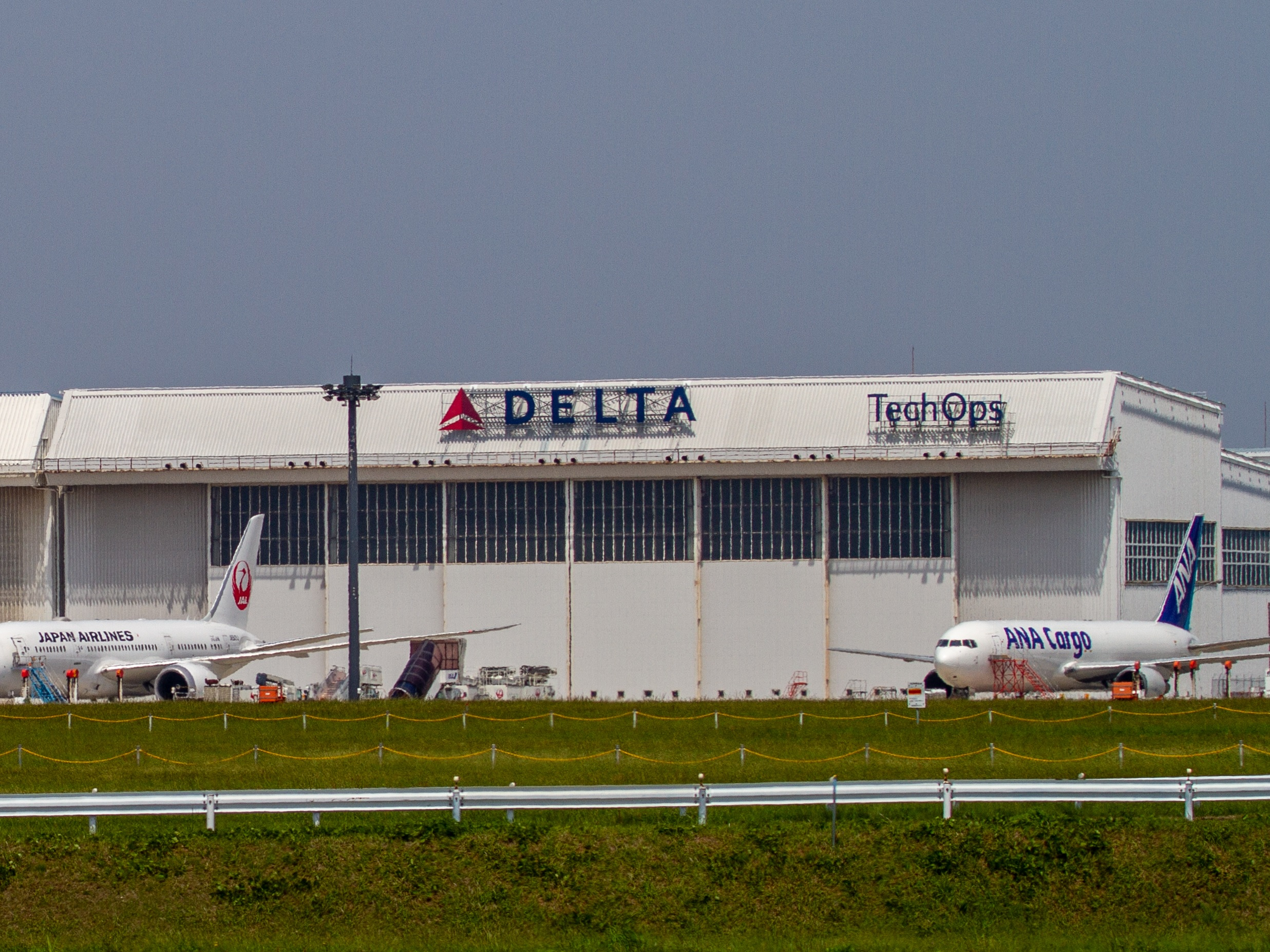 成田空港デルタ航空格納庫